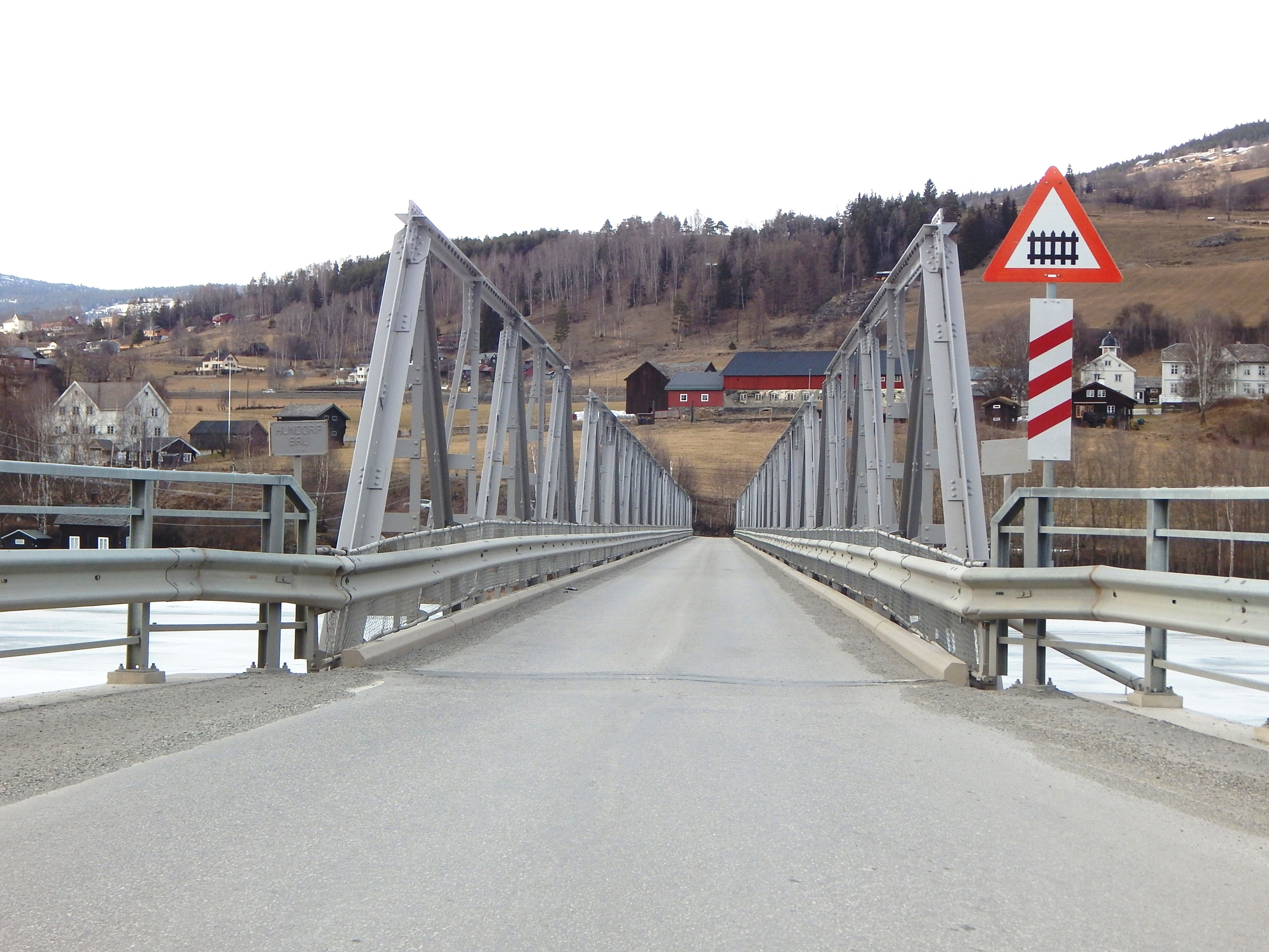 Hundorp bru med primær fylkesvei 256 sett fra vetsiden av Gudbrandsdalslågen